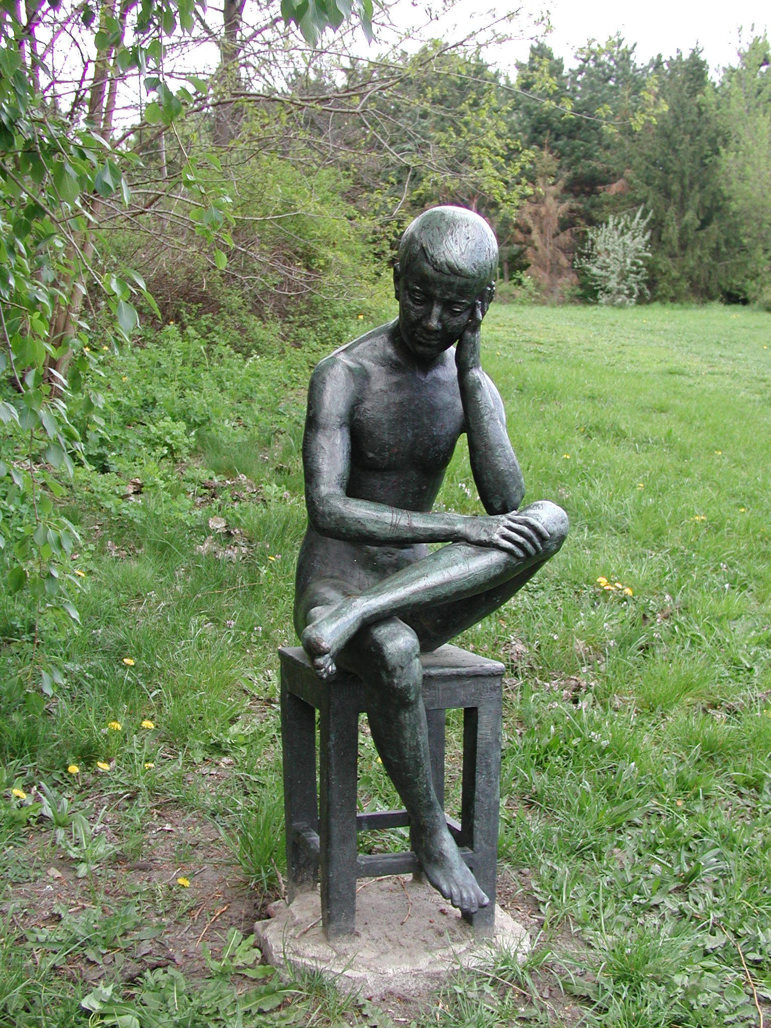 Skulptur Sitzender Junge von Werner Stötzer im Volkspark Prenzlauer Berg, Berlin, Deutschland.